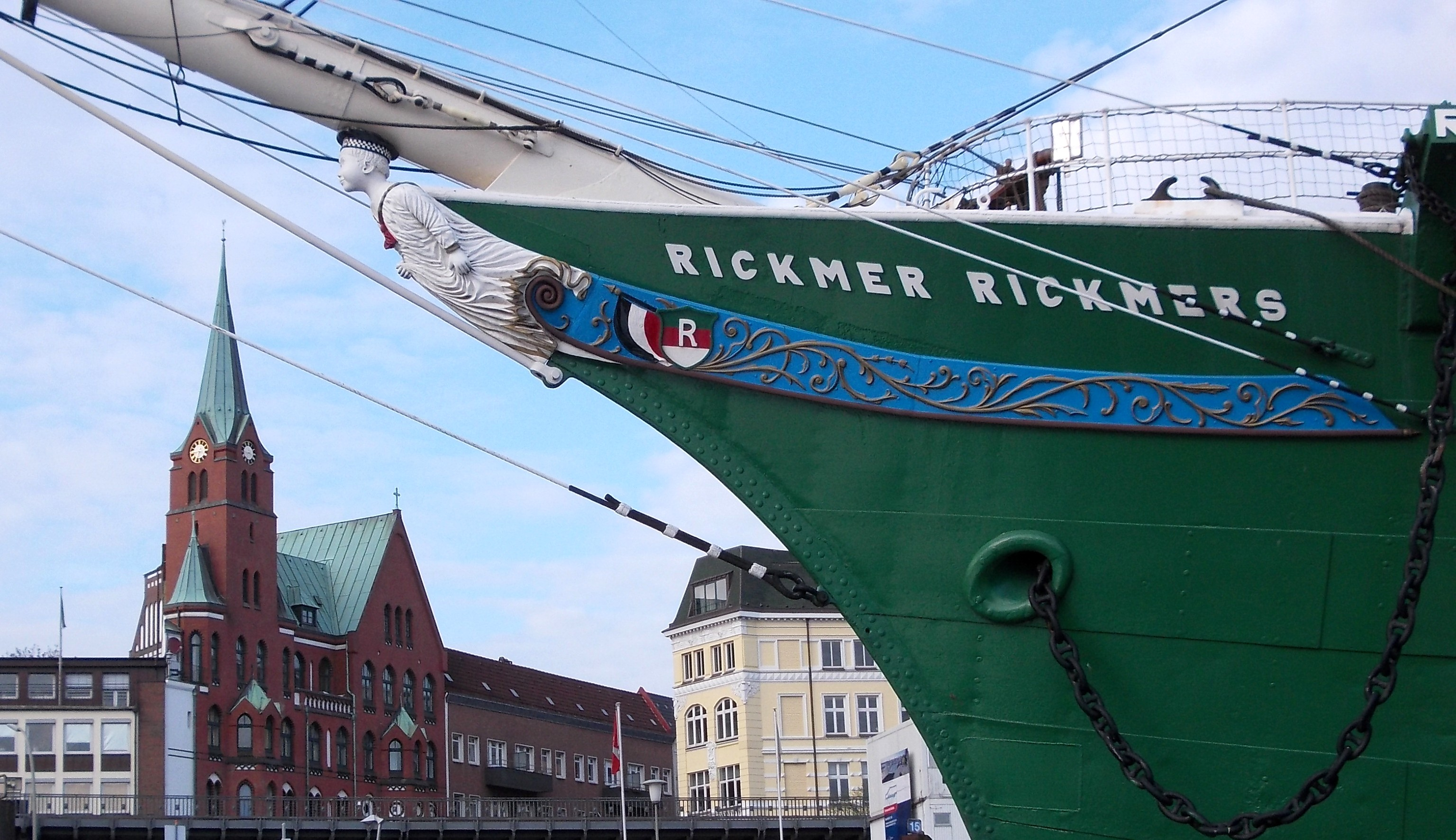 Schiffsname der Rickmer Rickmers